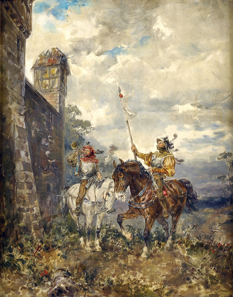 Mittelalterlicher Standartenträger. Signiert. Öl auf Holz, 40 x 32 cm